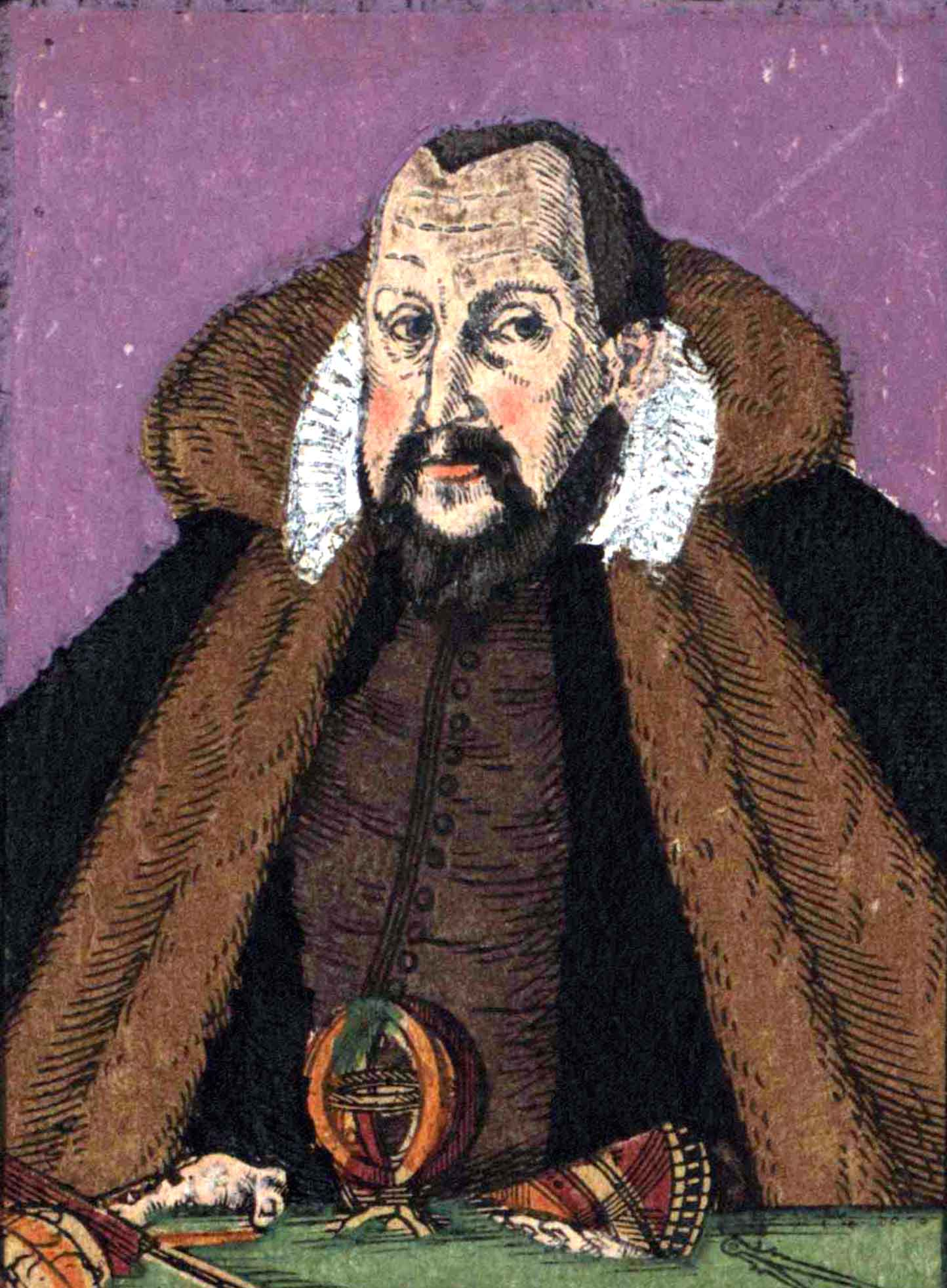 Scultetus, Bartholomäus (auch: Bartel Schiltetus; Schultz, Barthel Scholz; * 14.05.1540 in Görlitz; † 21.06.1614 ebd.) Bürgermeister Görlitz, Mathematiker, Astronom, Kartograph, Kalendermacher, Historiker, Chronist und Mediziner